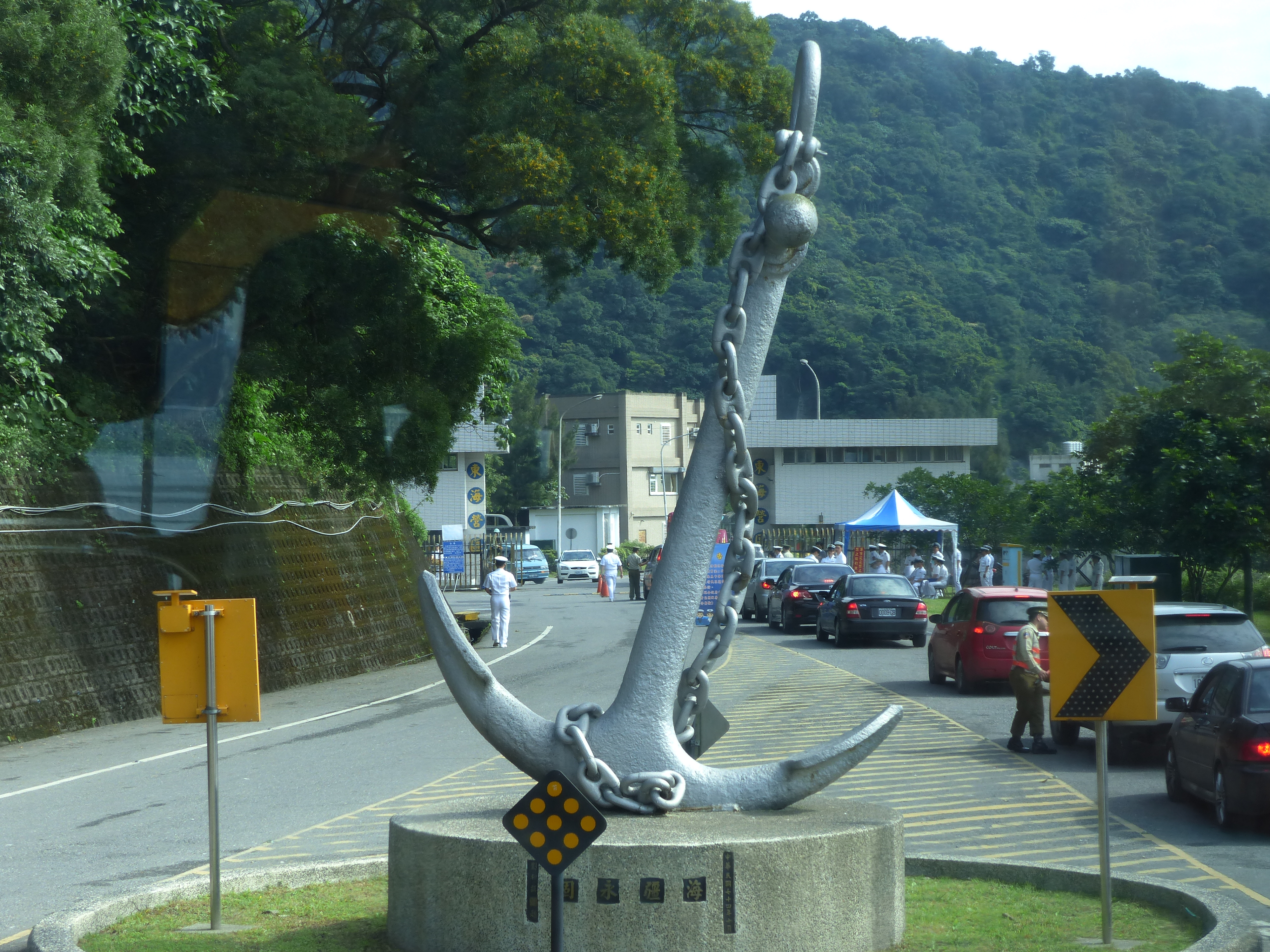 中華民國海軍中正軍港（東海營區）入口前的山型錨，礎基1985年10月劉和謙題。